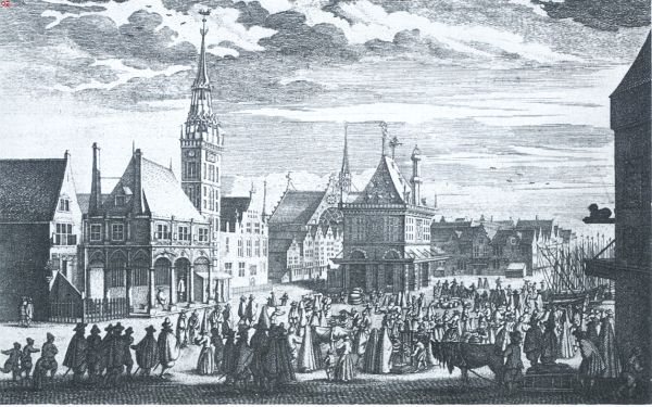 Het Oude Stadhuis, de Waag, de Nieuwe Kerk en eenige huizen, zo als zy zig vertoonden, na ’t stigten der Waage, tot omtrent het jaar 1615. gedaan naar eene afbeelding van Claas Jansz. Visscher. Ets. Amsterdam, Stadsarchief Amsterdam (afbeeldingsbestand 010097002576).